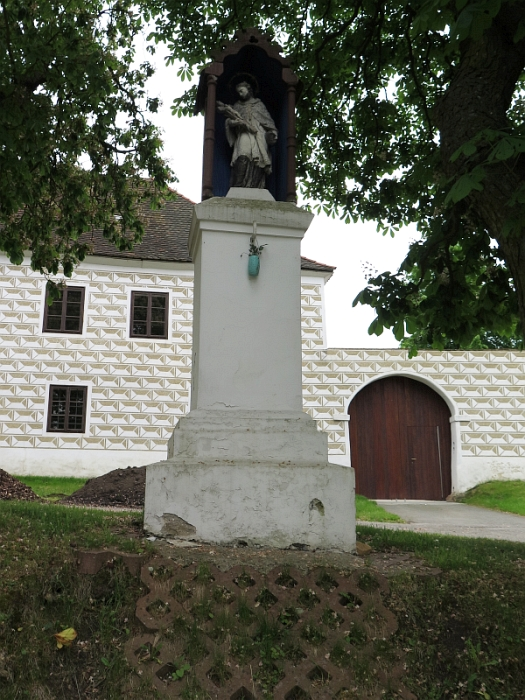 Kaplička svatého Jana Nepomuckého, při čp. 17, Chotýčany.